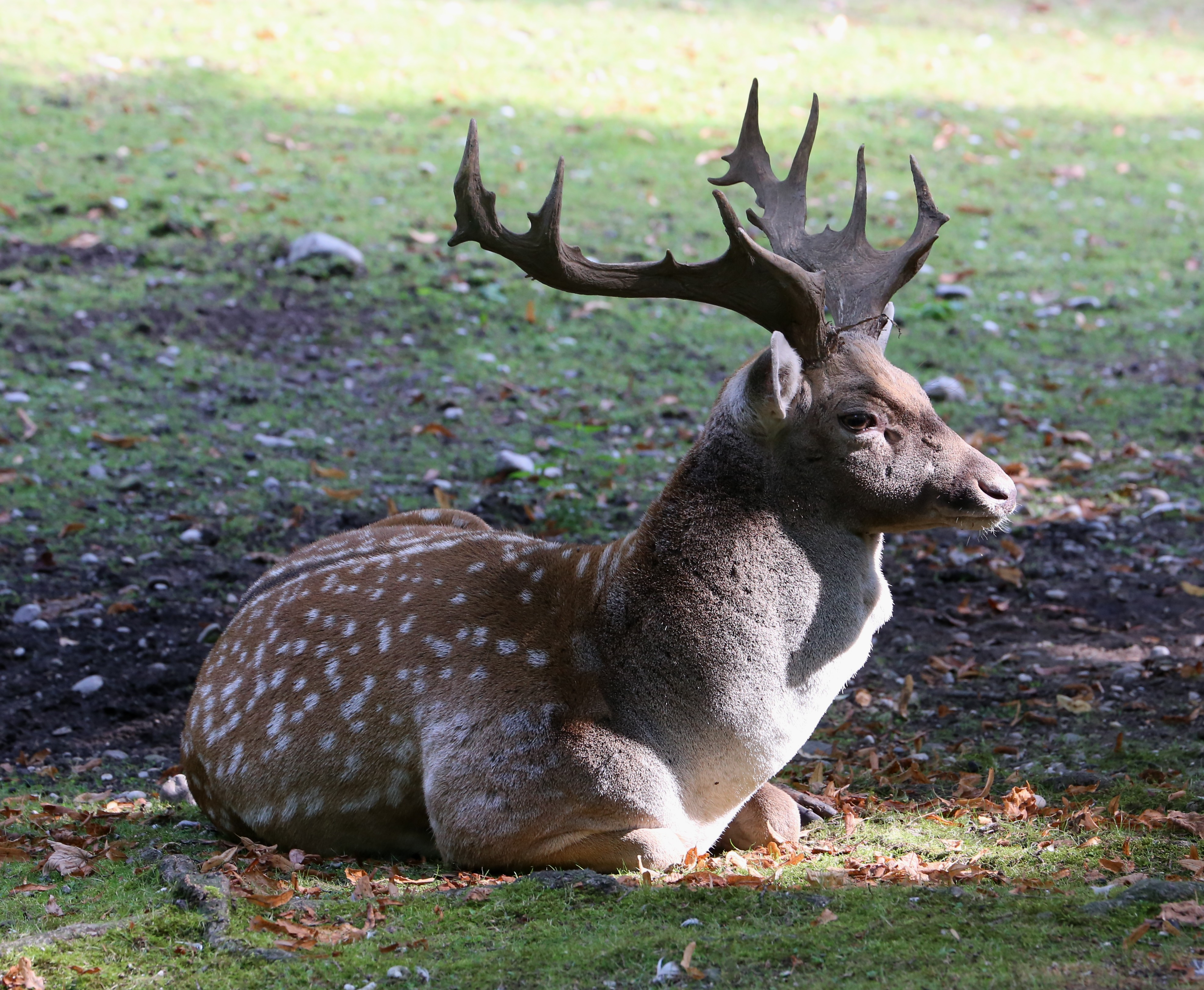 Mesopotamischer Damhirsch (Dama dama mesopotamica), Tierpark Hellabrunn, München